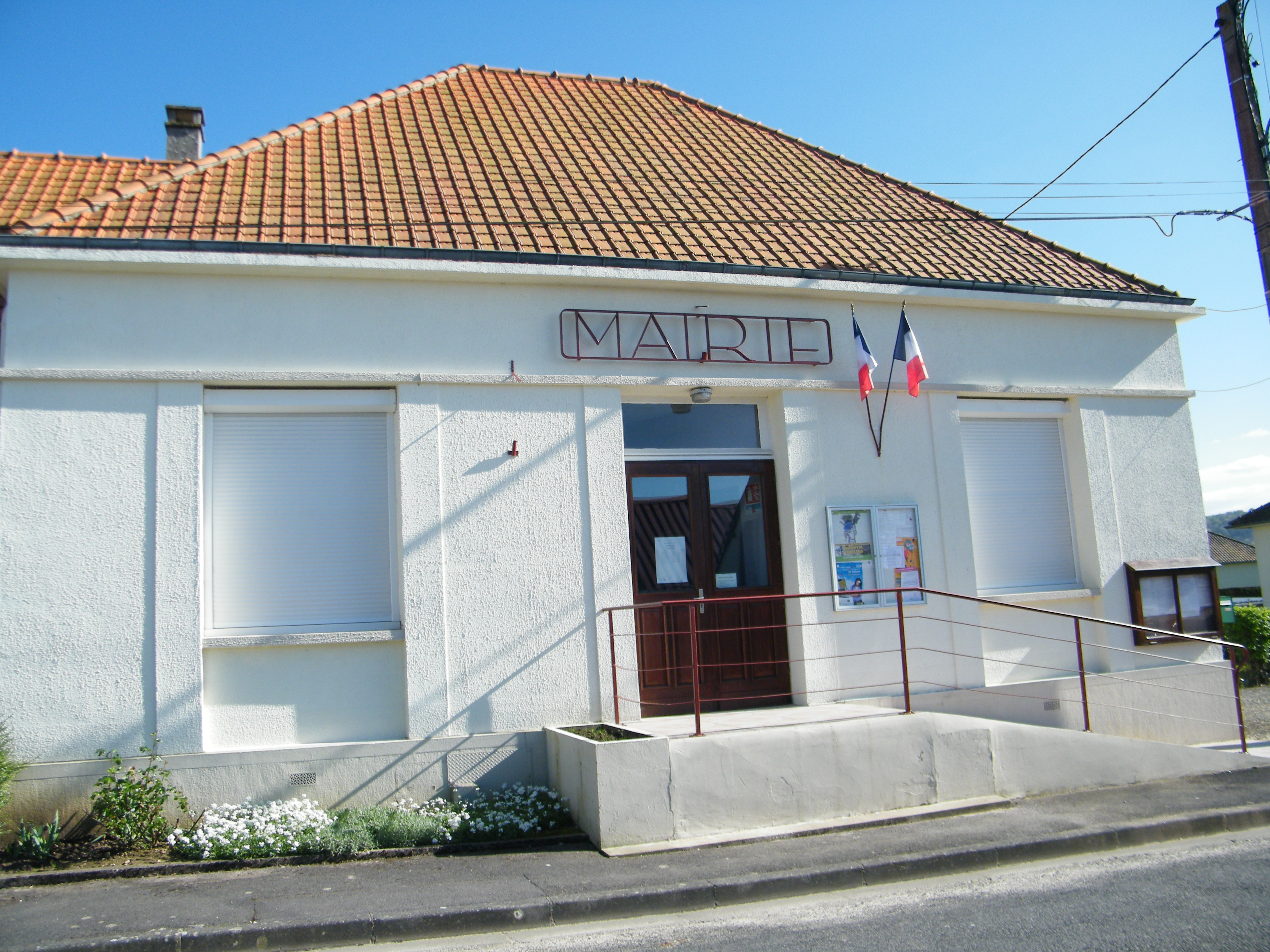 La mairie.